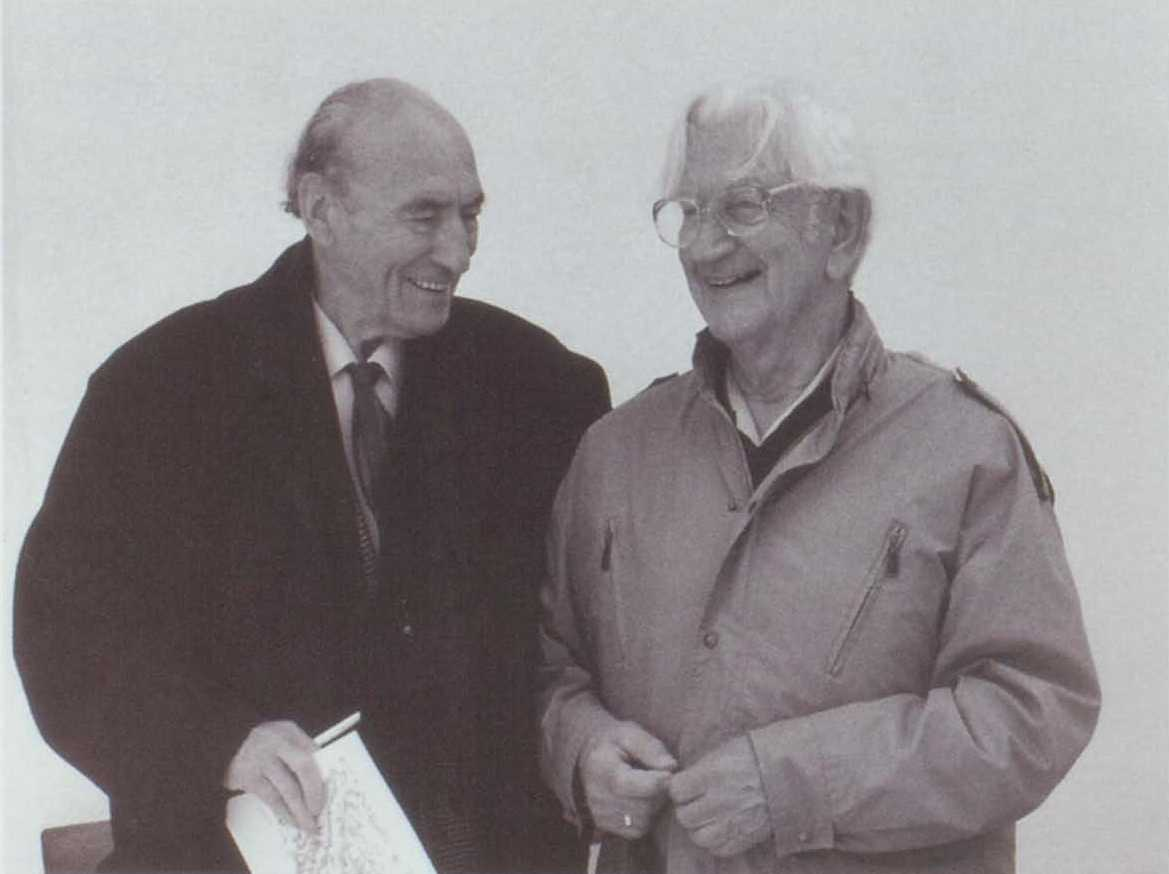 Architekt Heinz Rall (links) und Architekt Hans Röper, 2004.